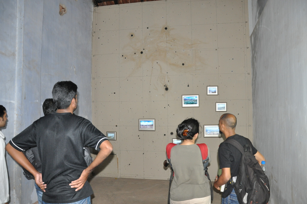 ആസ്​പിൻവാൾ ഹൗസിൽ രോഹിണി ദേവഷേറിന്റെ 'പാർട്‌സ് അൺനോൺ' എന്ന വീഡിയോ ഇൻസ്റ്റലേഷൻ ആസ്വദിക്കുന്നവർ